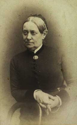 Natalie Zahle (1827-1913), privatskoleforstanderinde